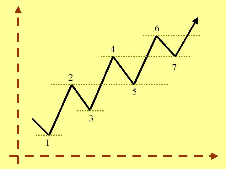 Description: esquema de cambio de roles de soportes y resistencias Source: Trabajo propio Author: LCB Date: Julio 21, 2006 Authorization: Dominio Público